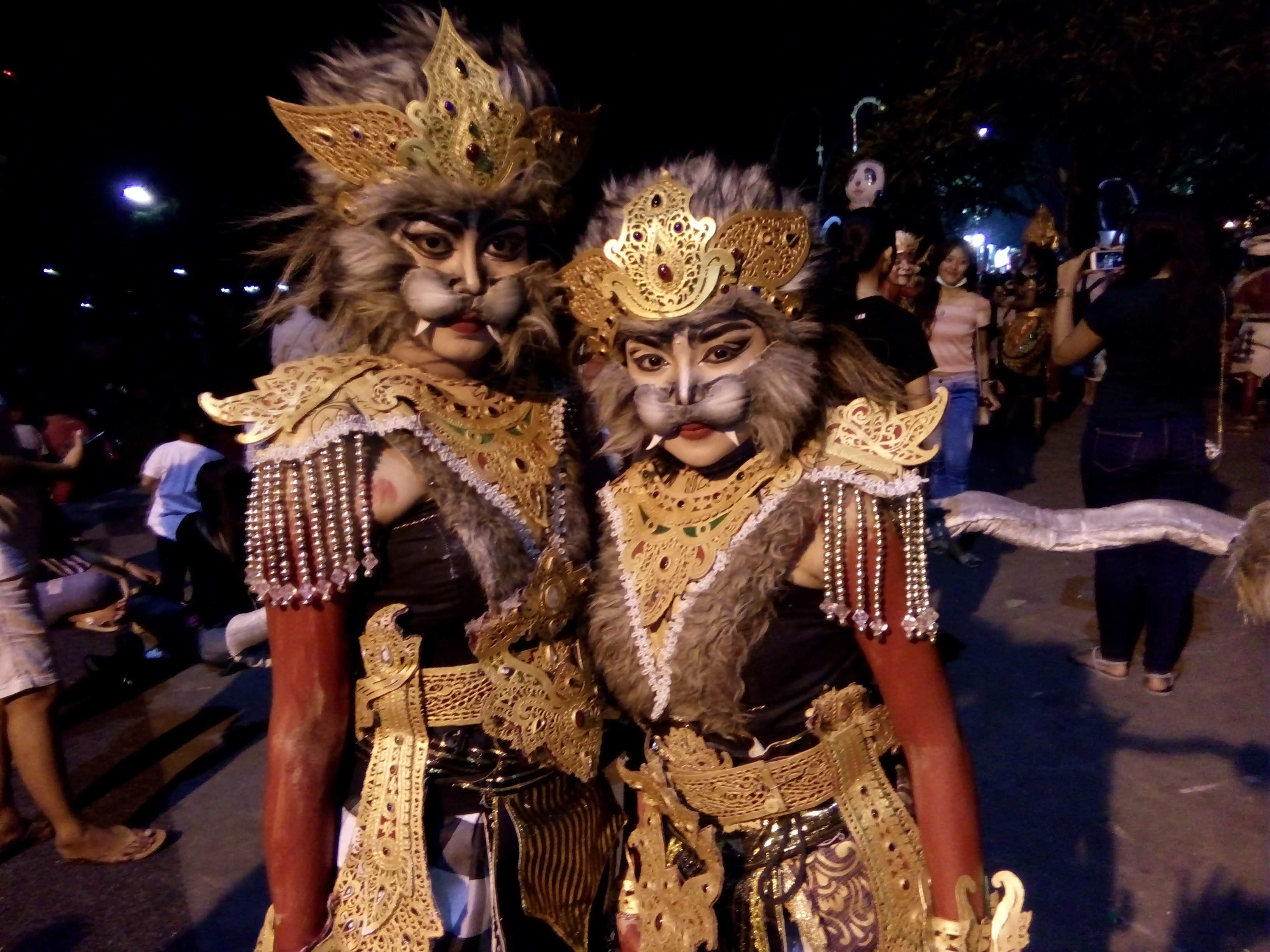 Peserta Baleganjur 2019 dari Denpasar Barat